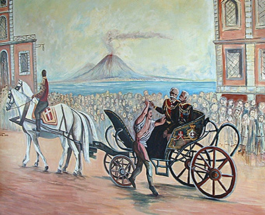 Mural público em Sabóia di Lucania.